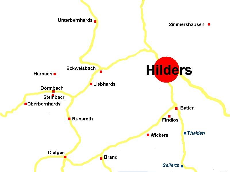 Hilders und seine Ortsteile